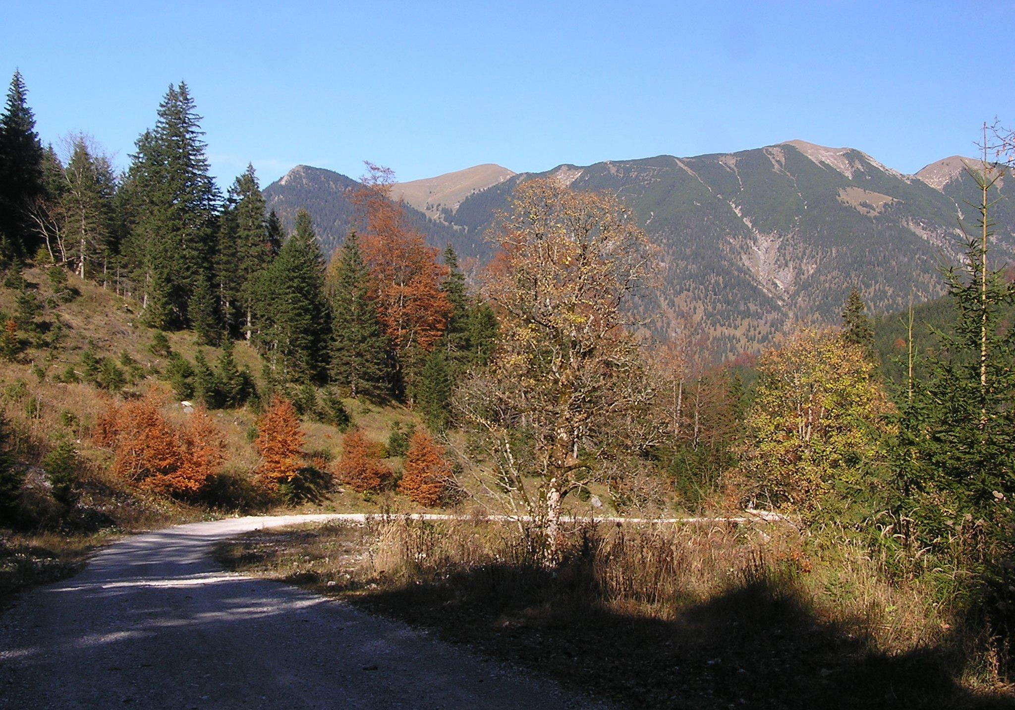 Johannistal im Karwendelgebiet (nördliches Tirol), Fahrweg zur Falkenhütte